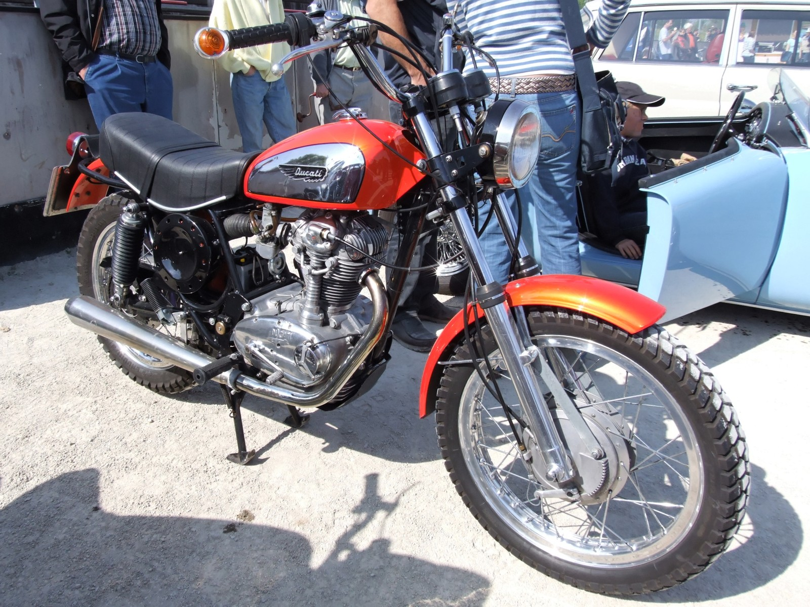 Quelle: selbst fotografiert, 04/2007 Fotograf: Späth Chr.